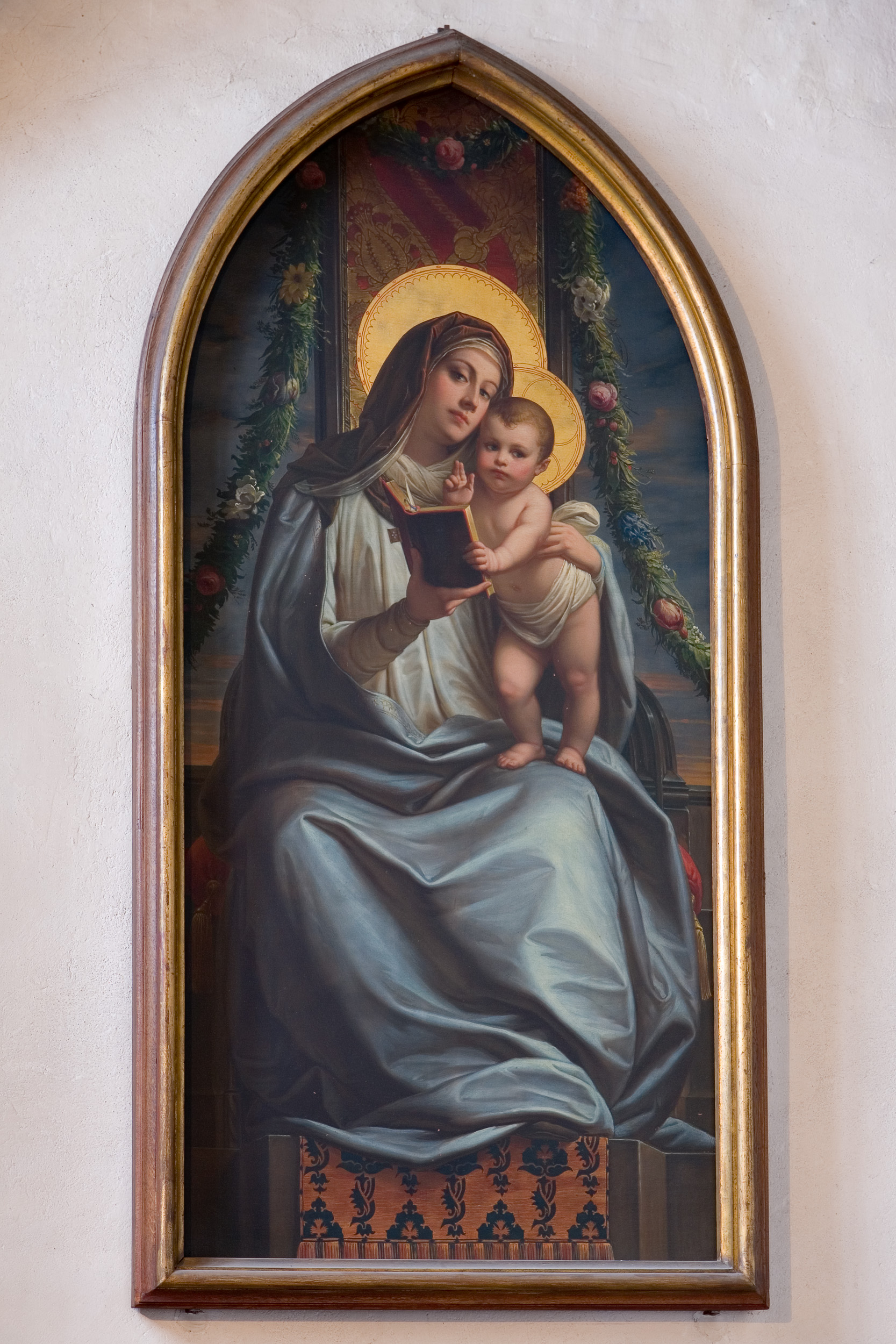 Mittelbild des im Zweiten Weltkrieg zerstörten Marienaltars von Vinzenz Statz (1854/55)